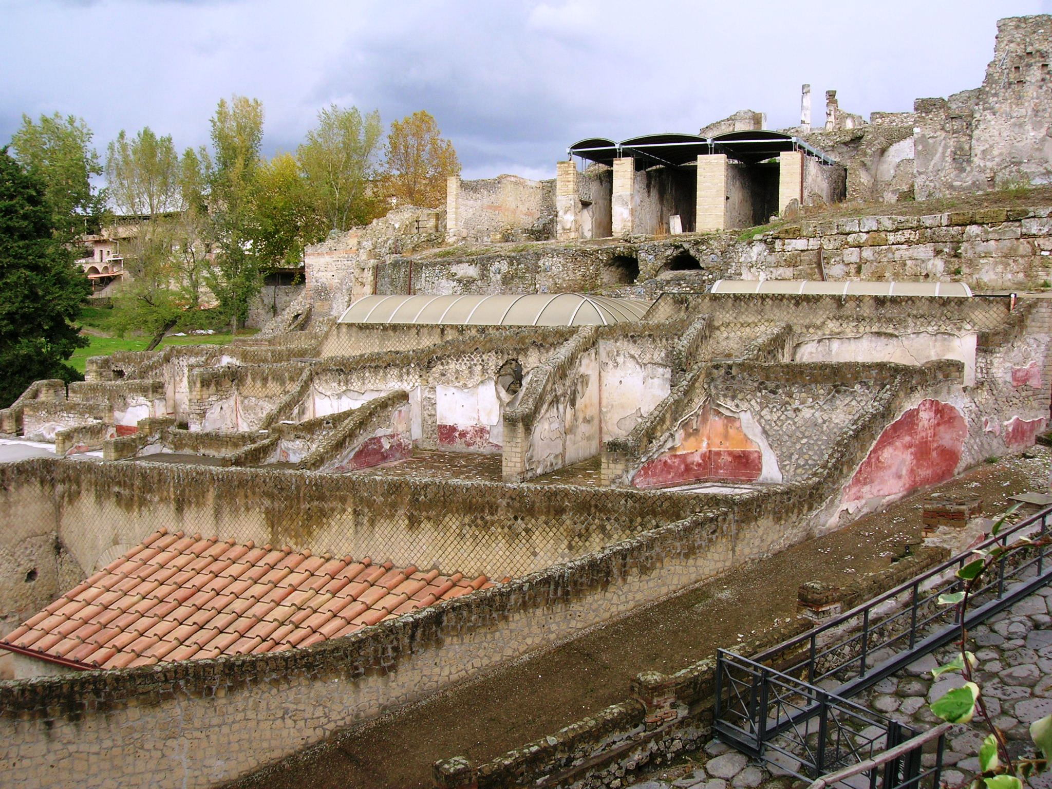 Terme suburbane